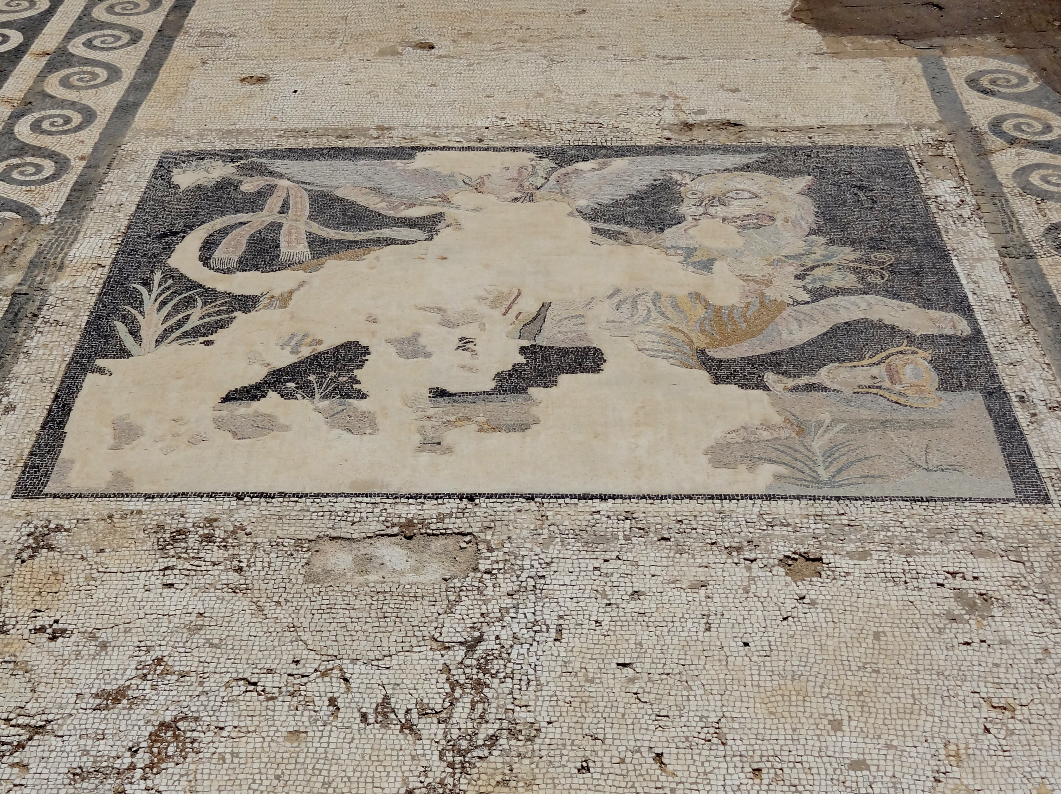 Bodenmosaik im Haus des Dionysos im Theaterviertel auf Delos, Kykladen, Griechenland